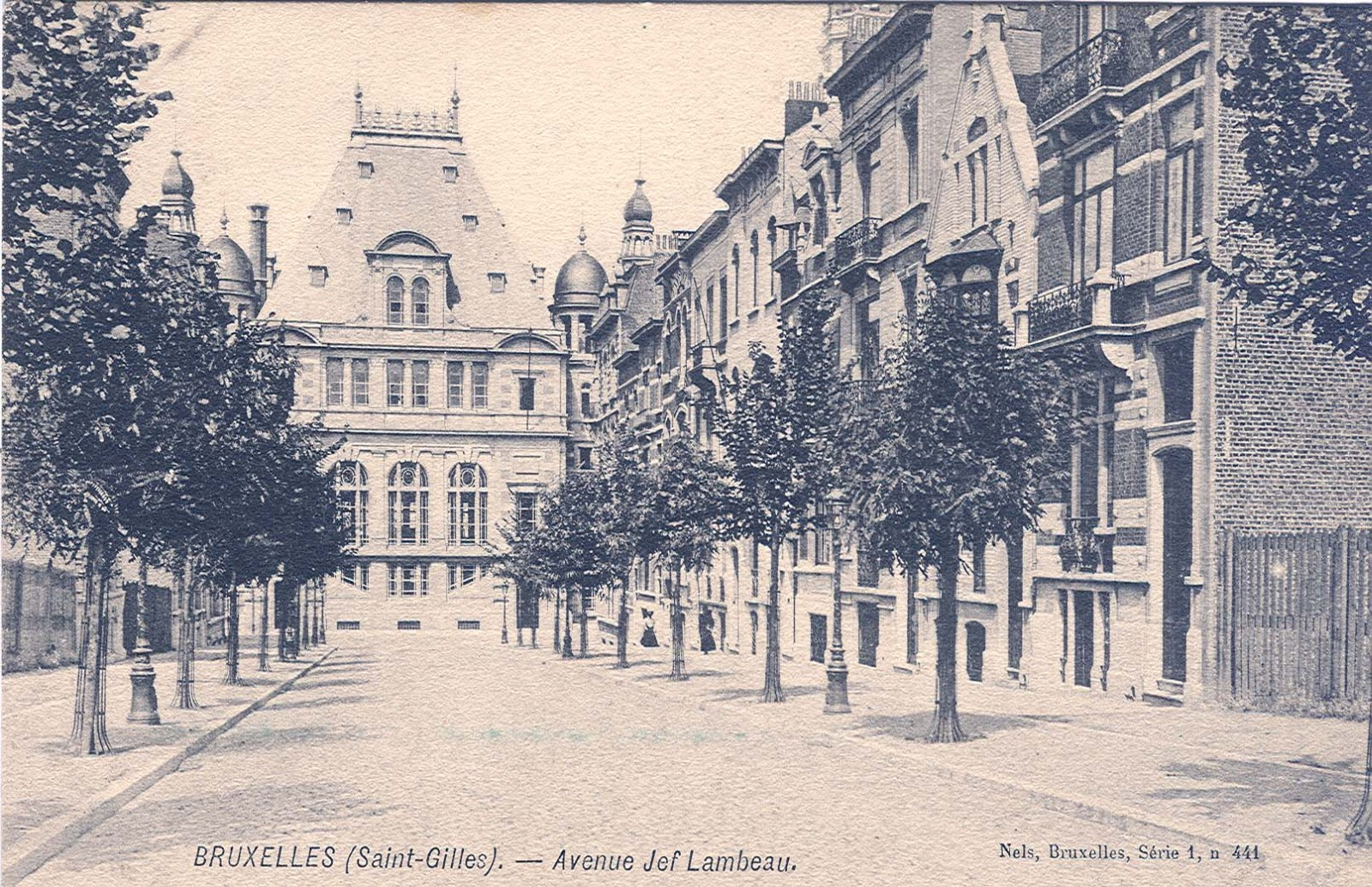 Carte postale de l'avenue jef lambeaux au début du XXe siècle.